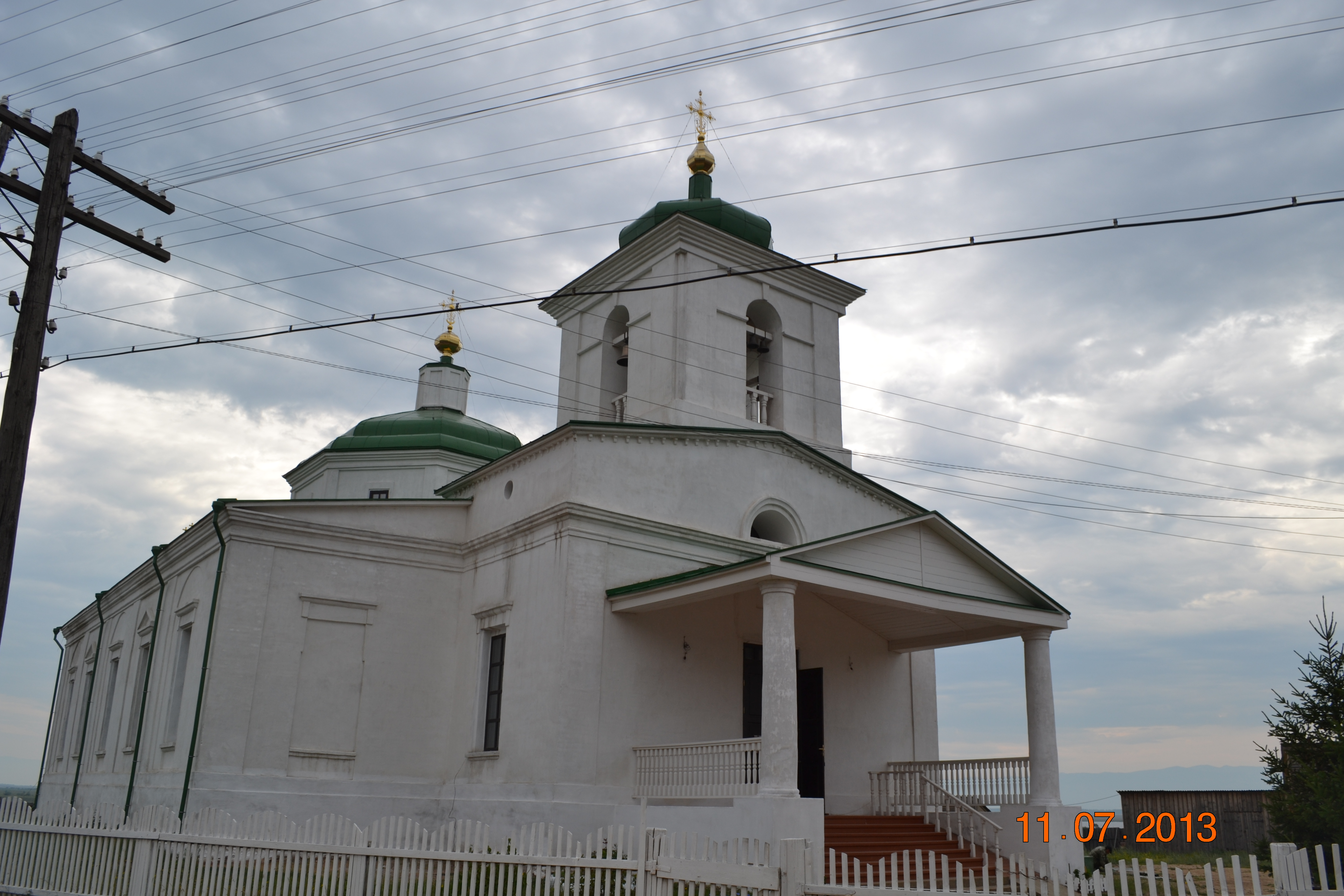 Спасо-Преображенский собор в с. Баргузин